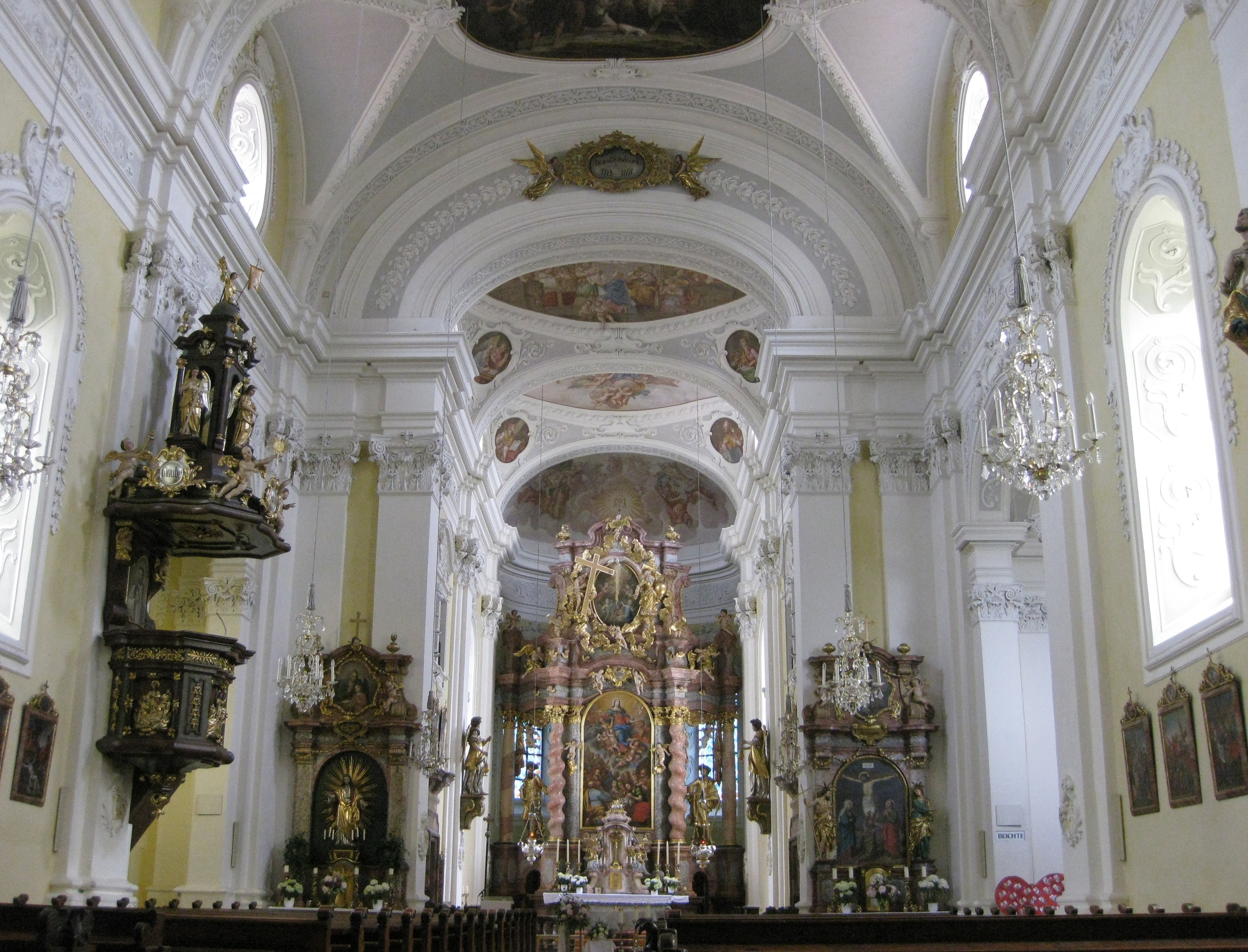 neugebaut nach dem großen Brand von 1891